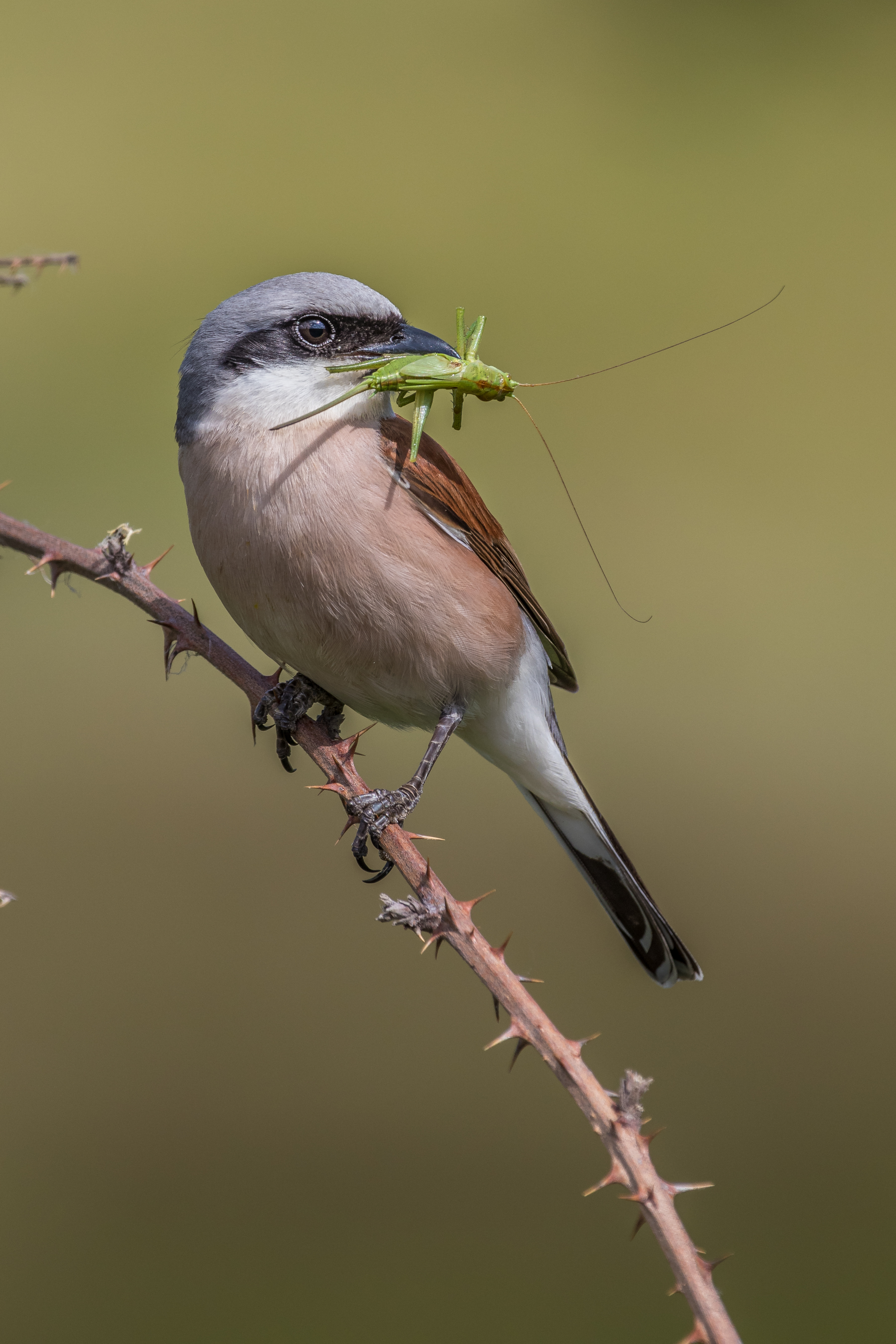 Neuntöter erbeuten in erster Linie Großinsekten, aber auch junge Eidechsen, Blindschleichen und Schlangen. Gelegentlich spießen sie ihre Beute zur Bearbeitung oder Vorratshaltung auf Dornen auf.